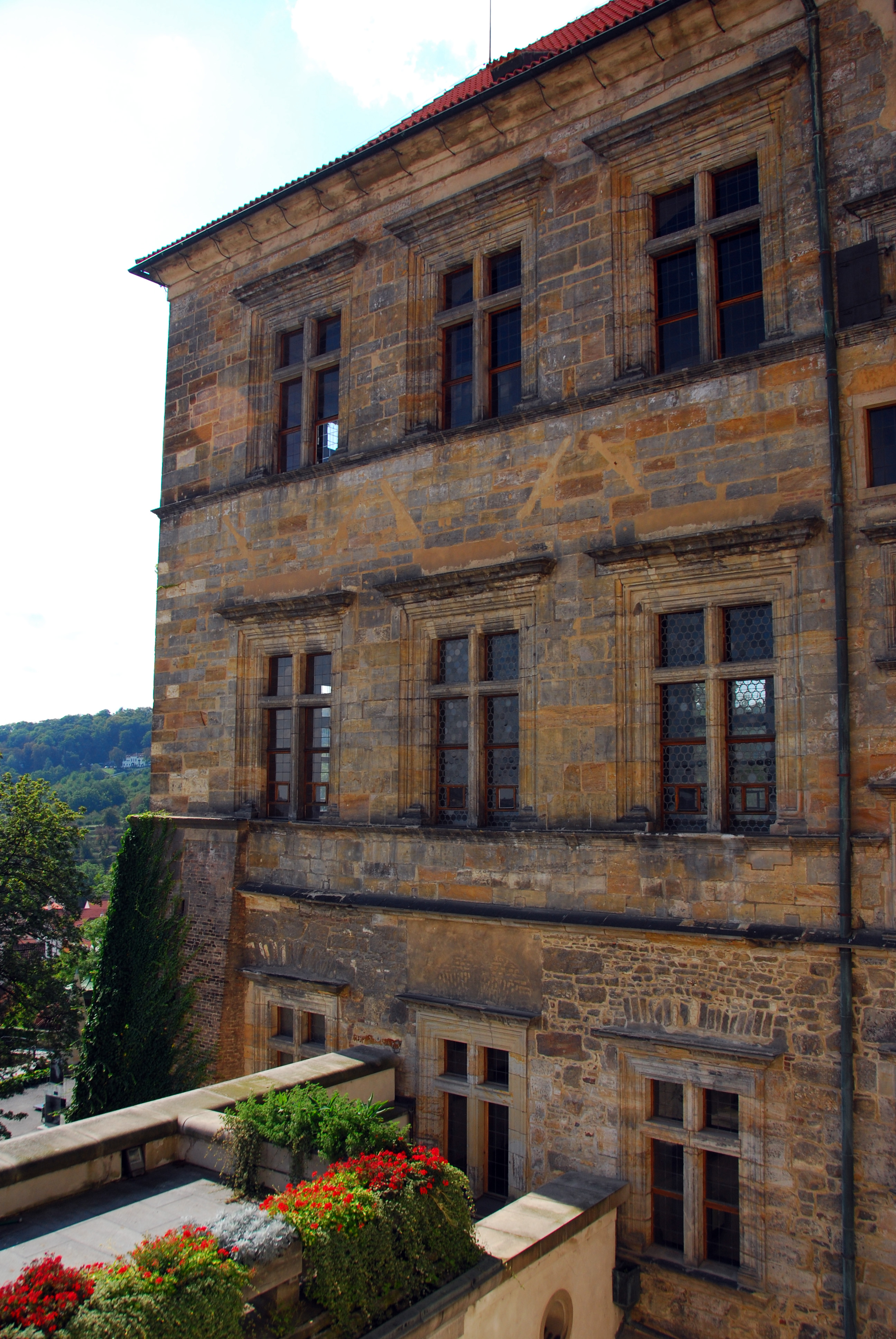 Pražský hrad, Starý královský palác, Ludvíkovo křídlo